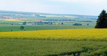 Elm von Vahlberg